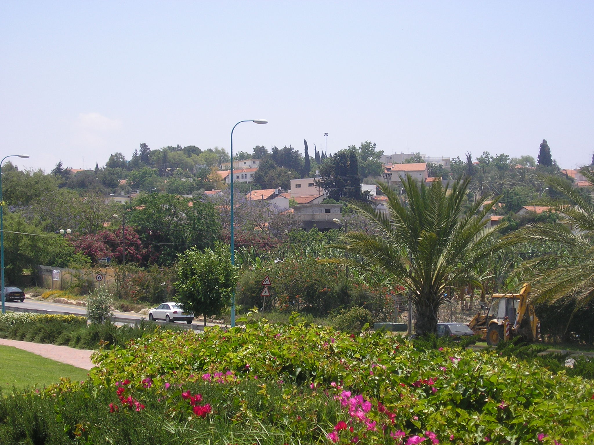 Shlomi, Israel, aview to the south from the industrial zone,שלומי, ישראל, מבט דרומה מאזור התעשייה